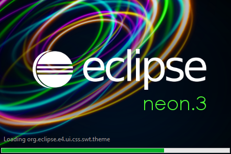 Pantalla de carga de Eclipse Luna